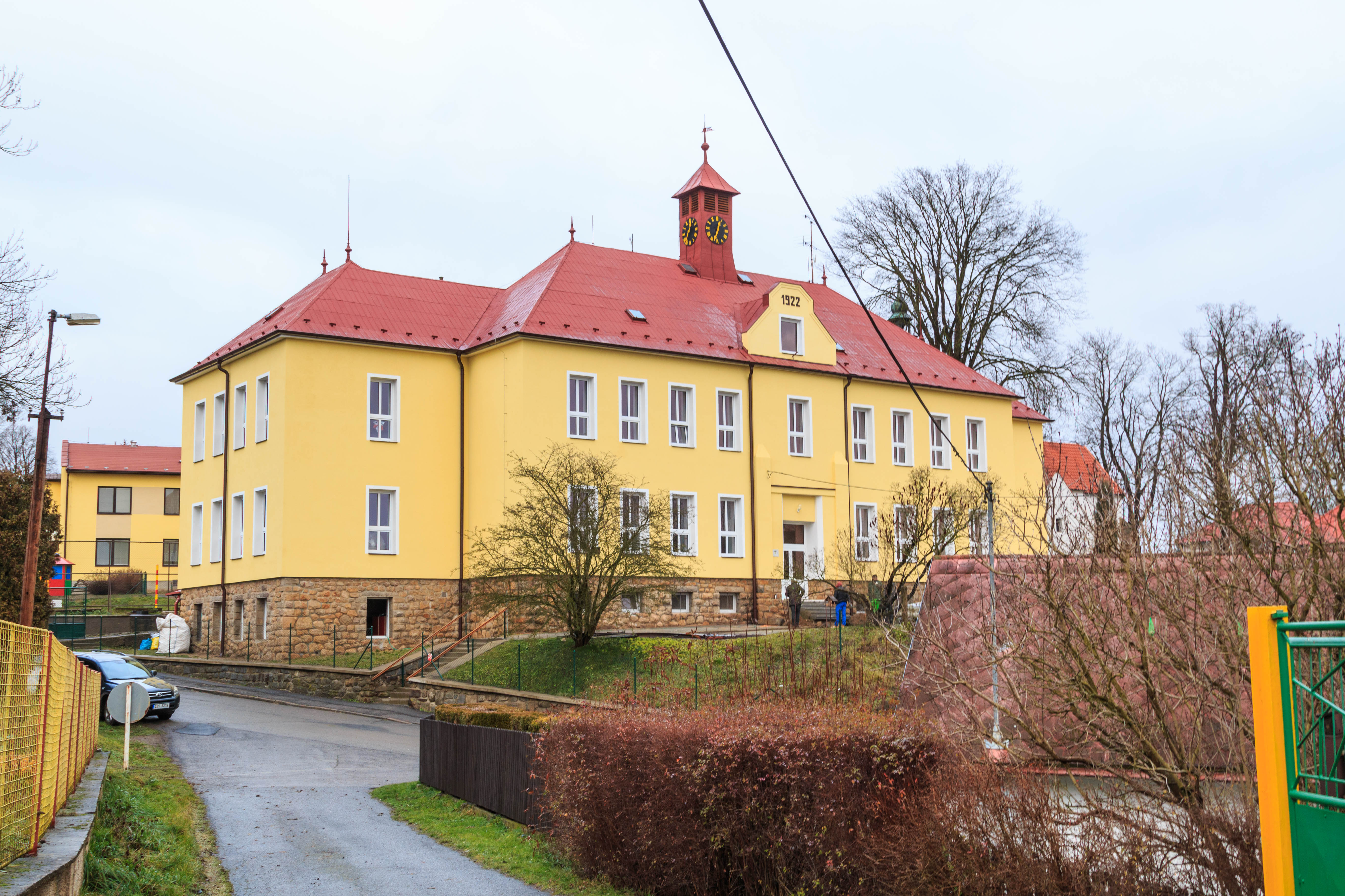 Lučice škola